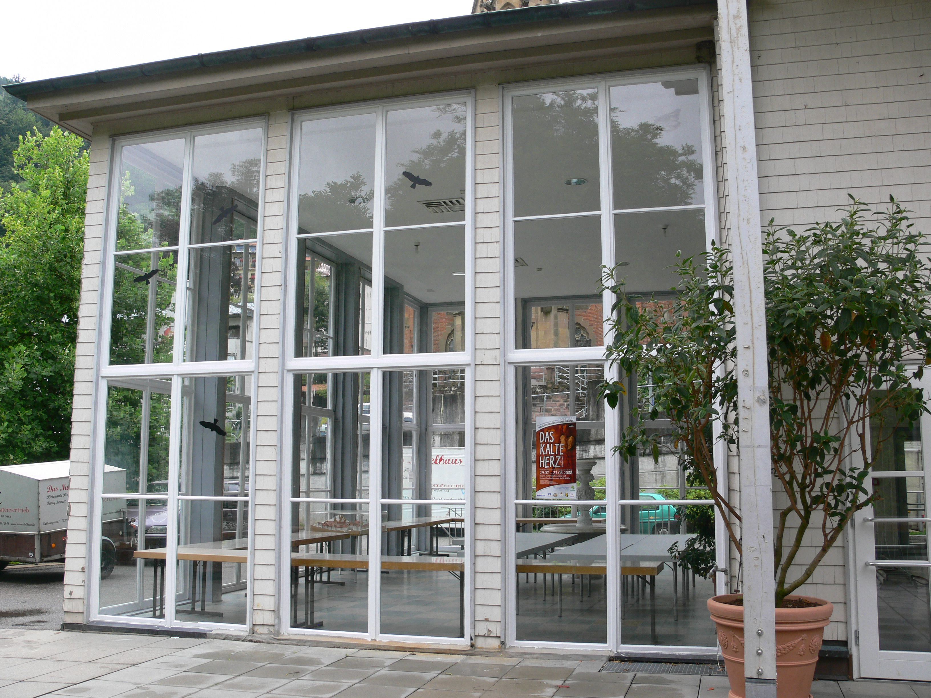 Bad Wildbad, Landkreis Calw, Baden-Württemberg: Trinkhalle